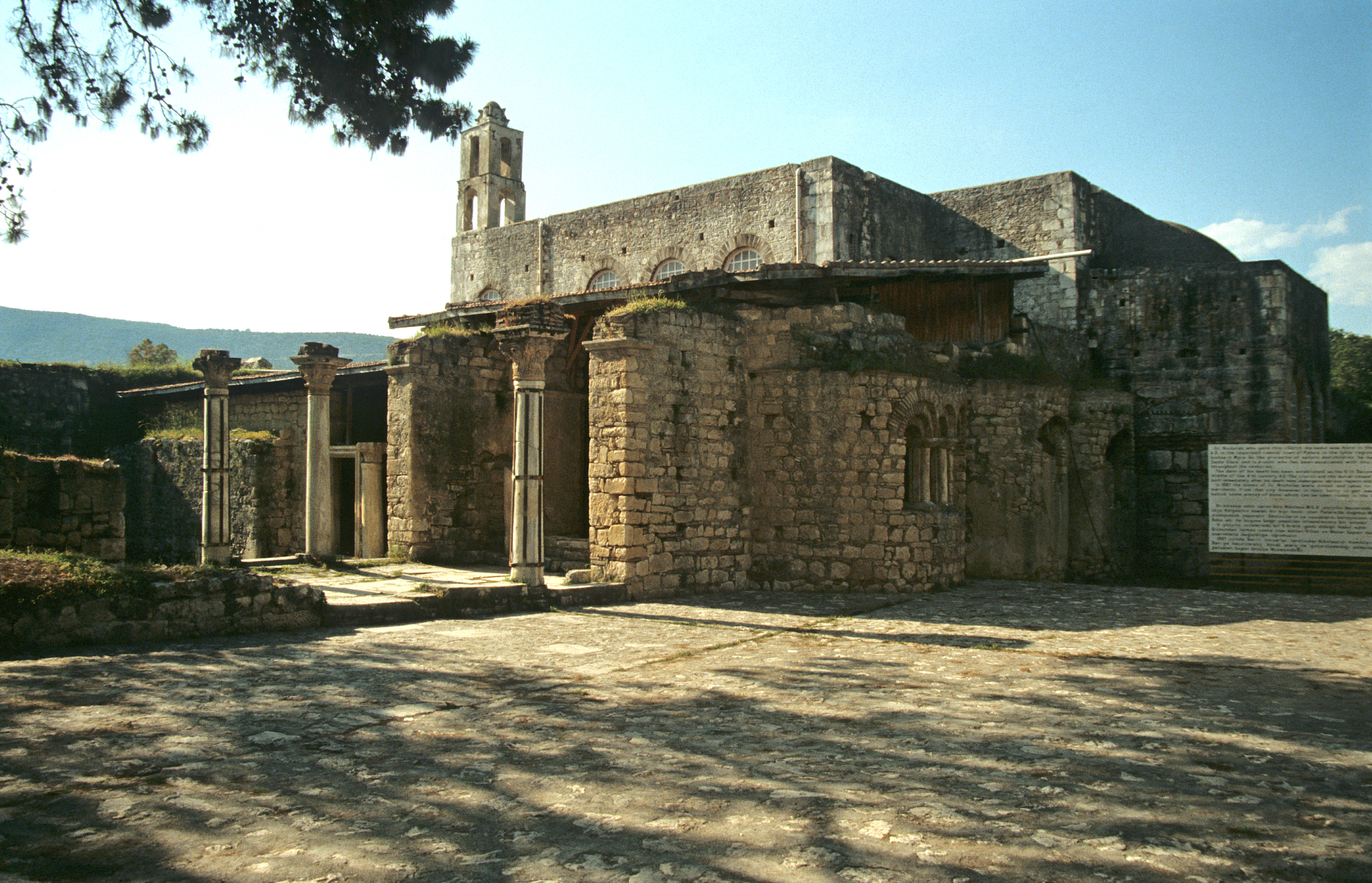 Nikolauskirche in Myra, Südtürkei